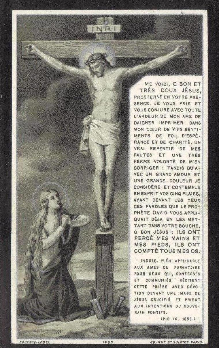 Image pieuse avec la "Prière à Jésus crucifié" donnée suite aux décès de fidèles.